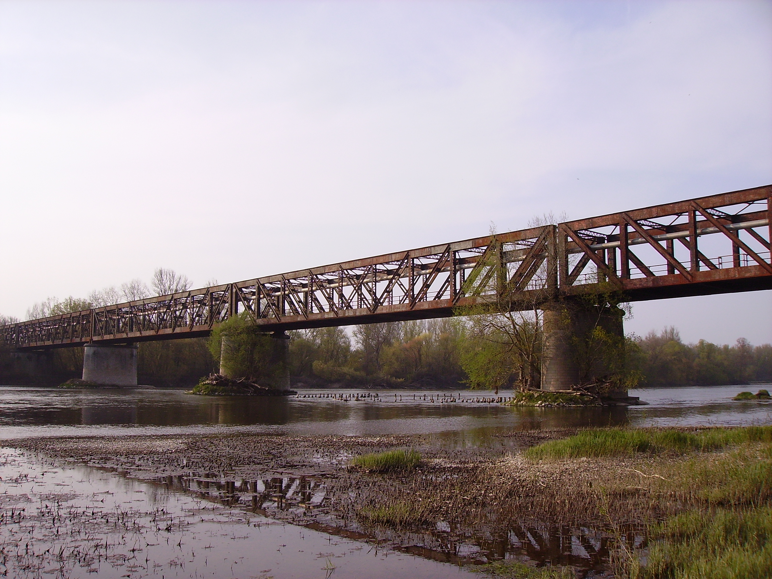 Viaduc ferroviaire (côté sud) enjambant la Loire (période de sécheresse), Cosne-Cours-sur-Loire, Nièvre, France.